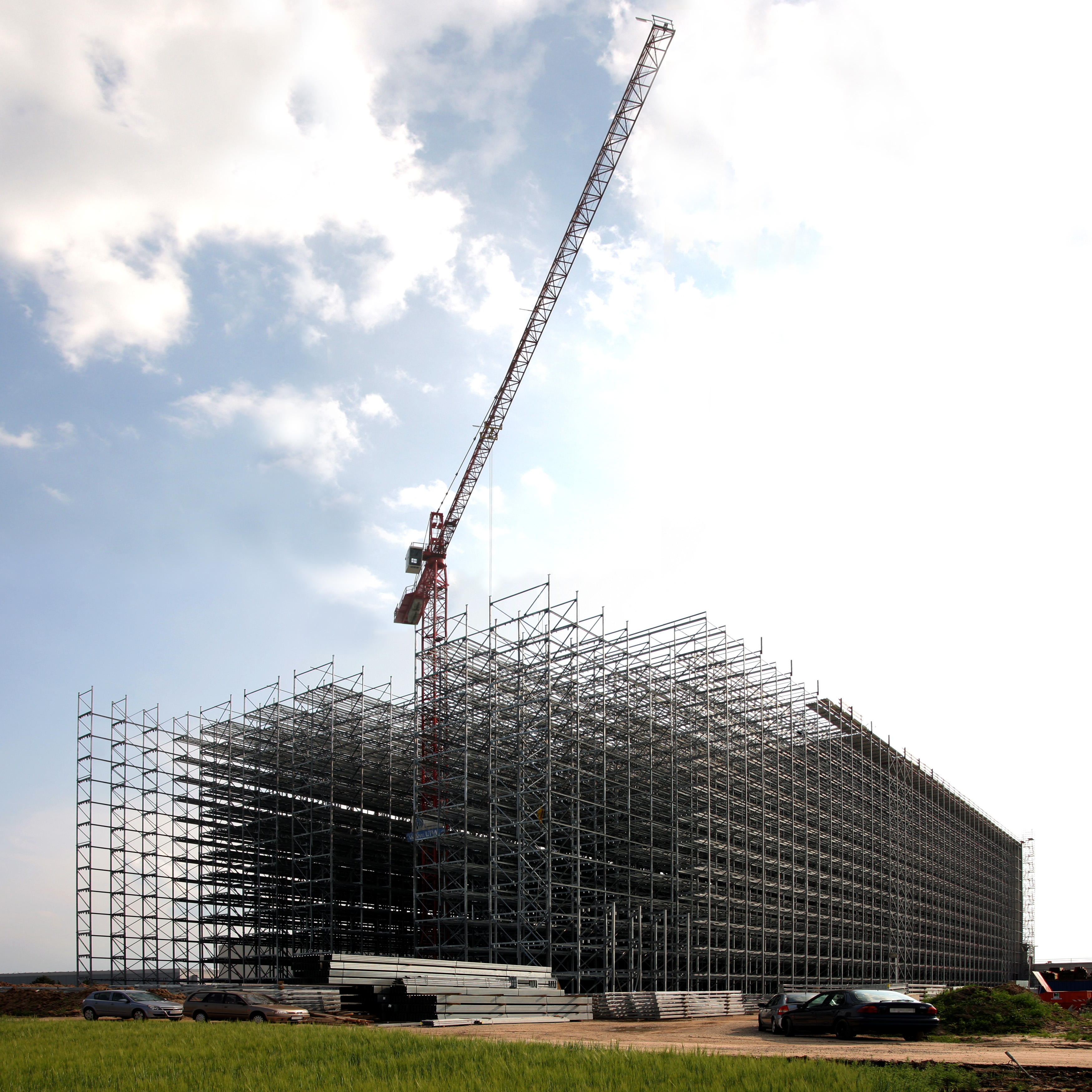 Ein im Bau befindliches Hochregallager der Firma Fresenius Medical Care im Industriegebiet von Biebeshiem (Südhessen). Das Bild wurde aus zwei einzelnen Aufnahmen zusammengesetzt. Die Perspektive wurde korrigiert. Die Kapazität beträgt 55.000 Europaletten. Am Bau beteiligt sind die Firmen Goldbeck, Voestalpine und LTW